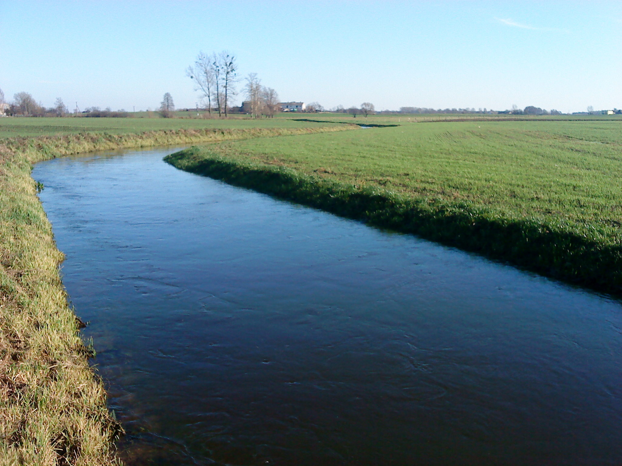 Struga Bawół ("Witkowska") w miejscowości Ruchocin